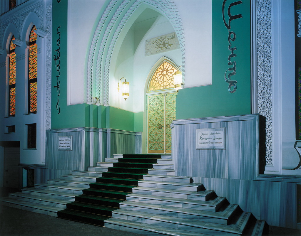 Арабский культурный центр (Одесса)